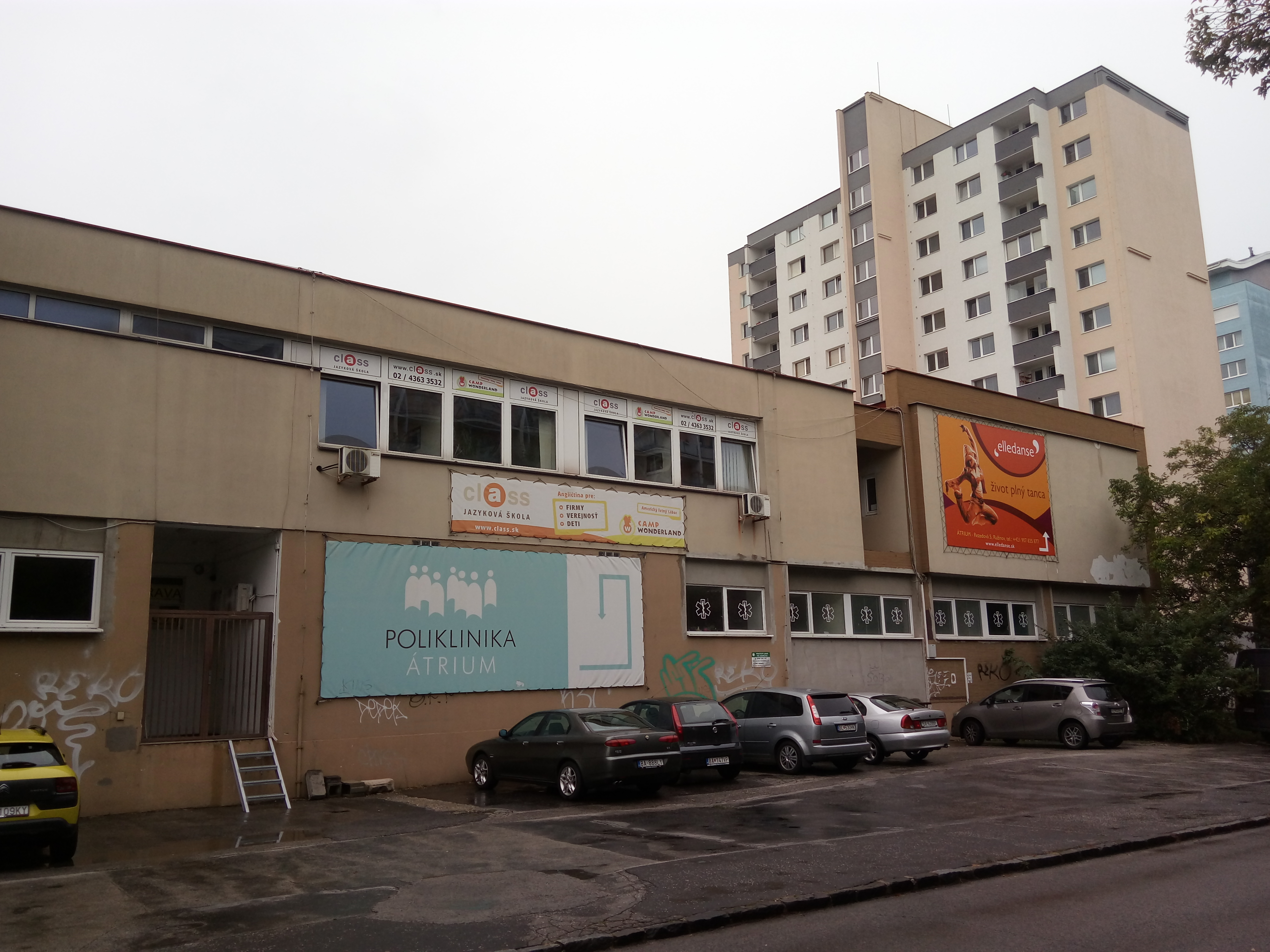 Rezedová 5, Ružinov, Bratislava